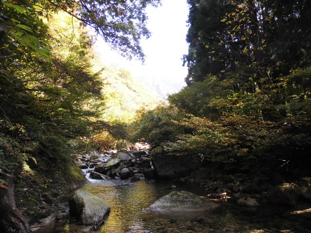 神字川台原水源